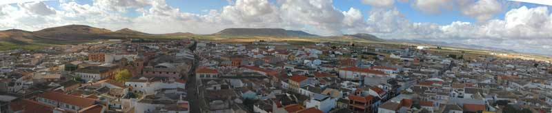 Imagen propiedad de David Carrero Fernández-Baillo. Copyright 2004 David Carrero Fernández-Baillo Categoría:España (imagen)